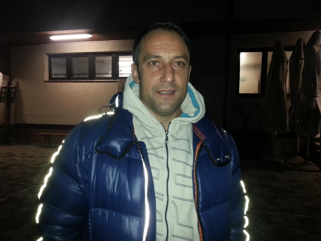 Aleš Čeh (1968) po zaostali tekmi 14.kroga 2 SNL med Šenčurjem in Krškim,ko je prišel po sina ki igra za NK Krško.